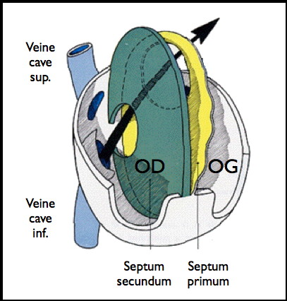 Foramen ovale - schéma anatomique